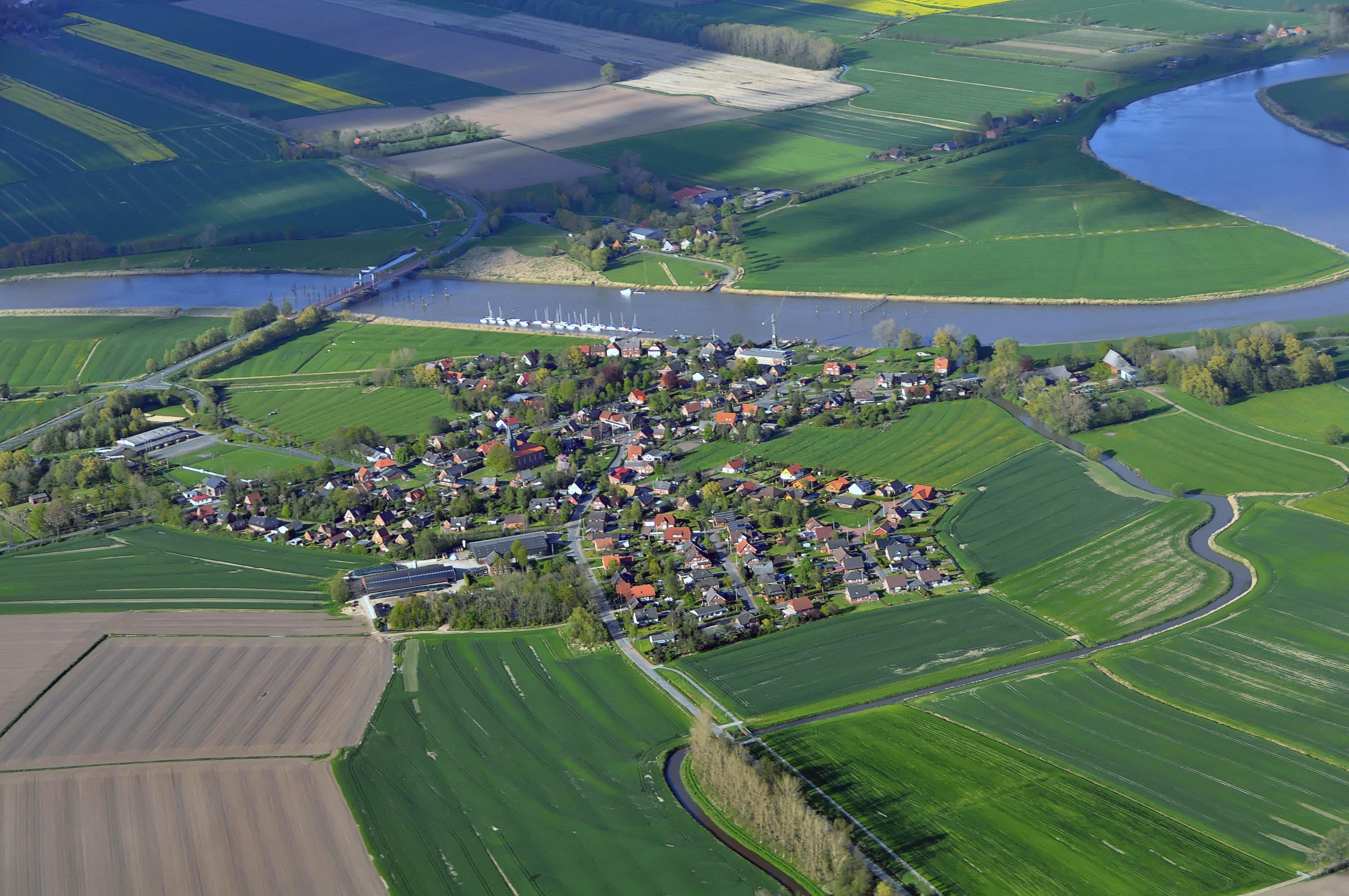 Luftbilder von der Nordseeküste 2012-05